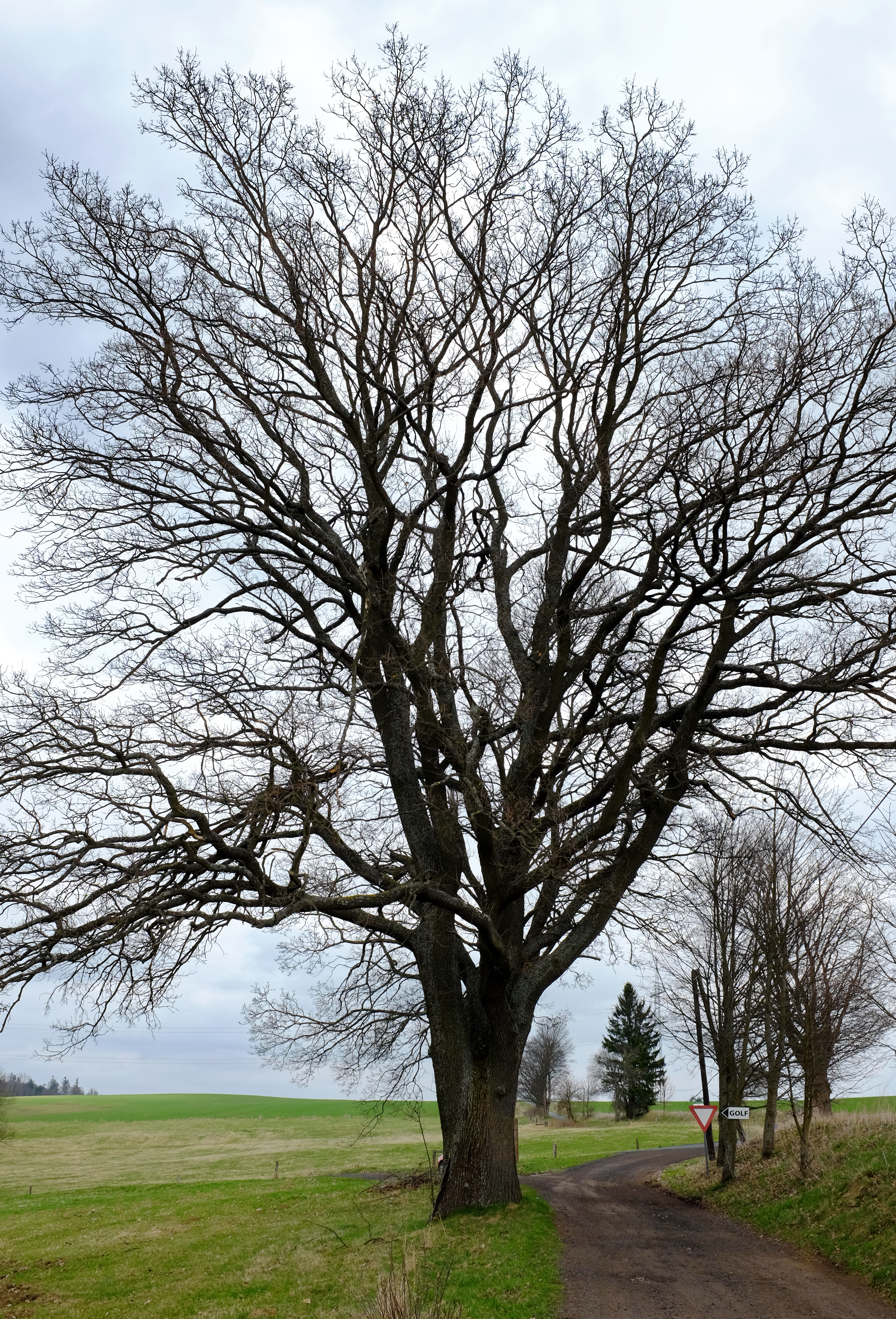 Památný strom - Dub nad Starým rybníkem, Křepkovice, část města Teplá, okres Cheb